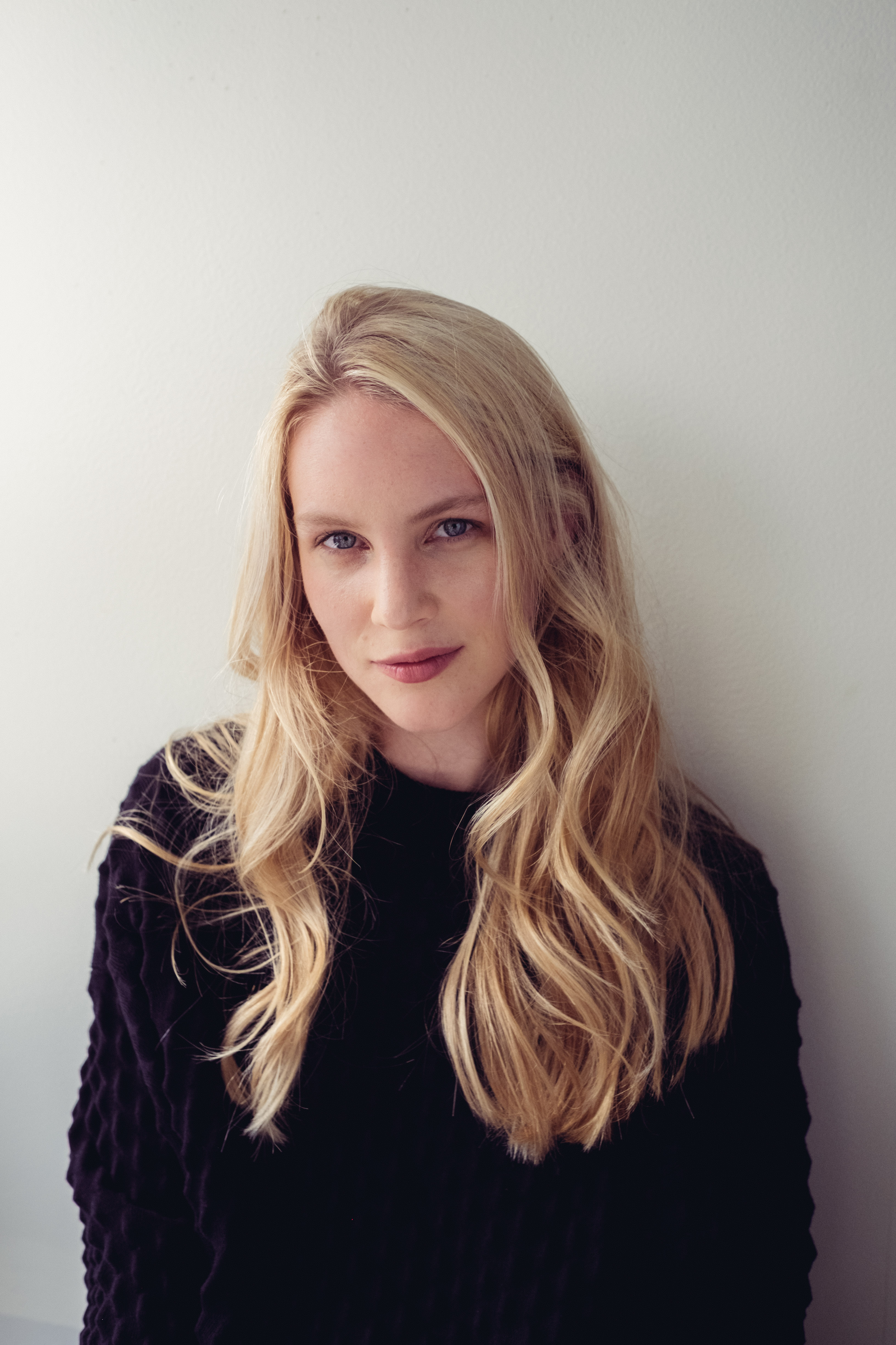 Lisa Smit in 2017